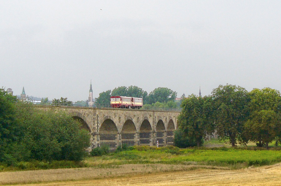 Osobní vlak Varnsdorf - Liberec projíždí hraniční most u Žitavy.